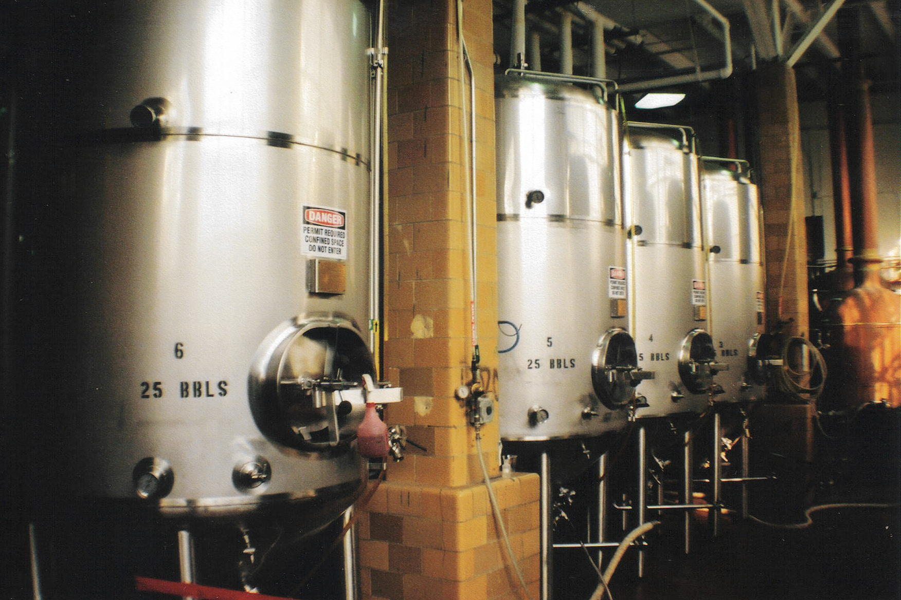 Modern fermenting tanks.